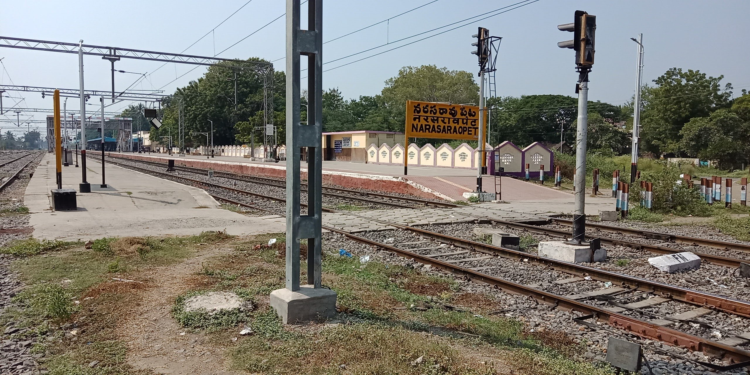 నరసరావుపేట రైల్వే స్టేషన్